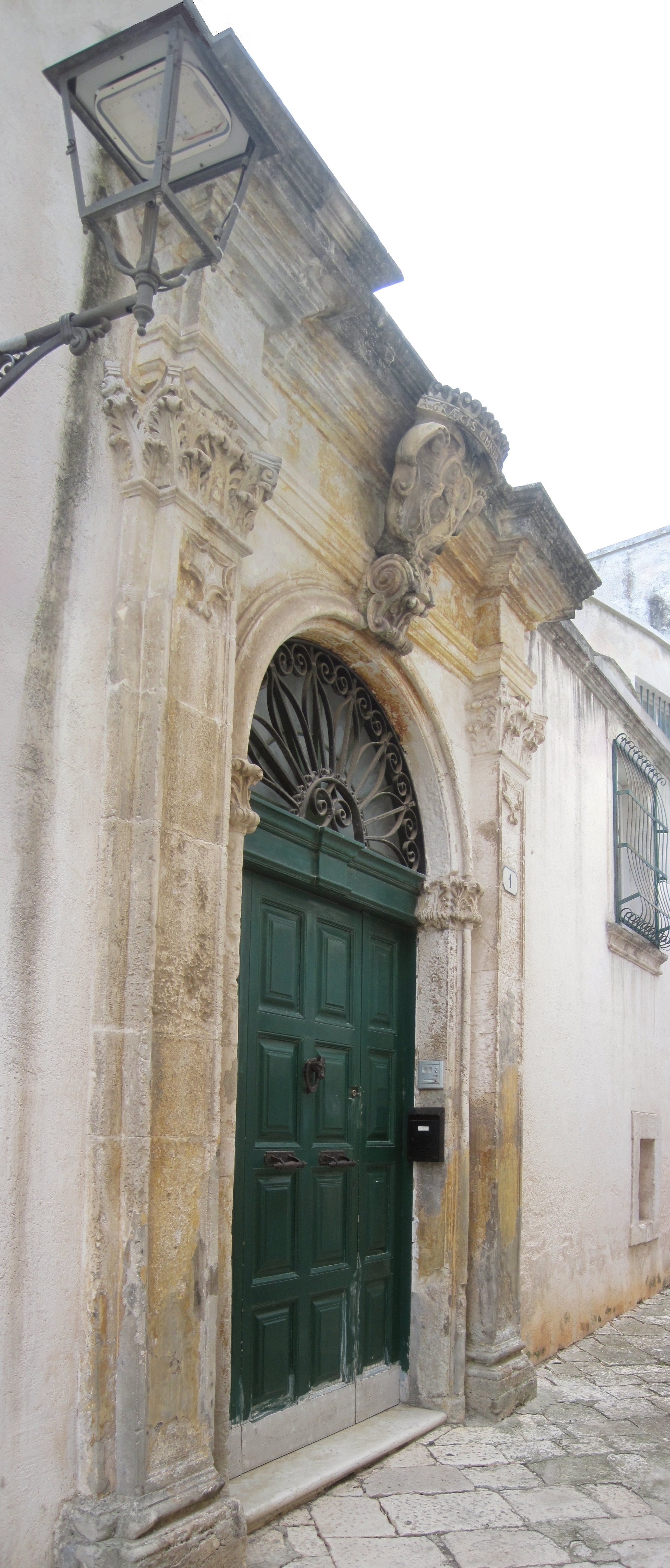 Il portale d'accesso principale al settecentesco palazzo Greco situato all'interno del centro storico di Ceglie Messapica